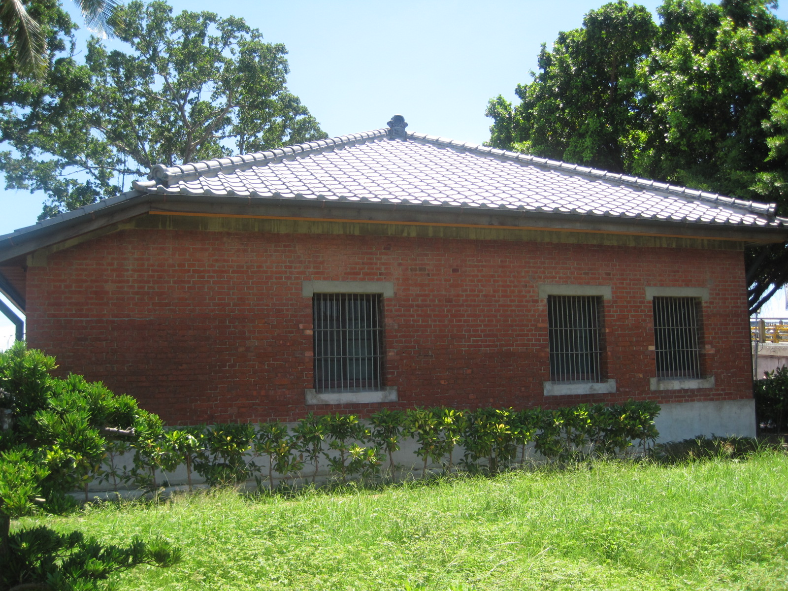 臺南運河博物館背面